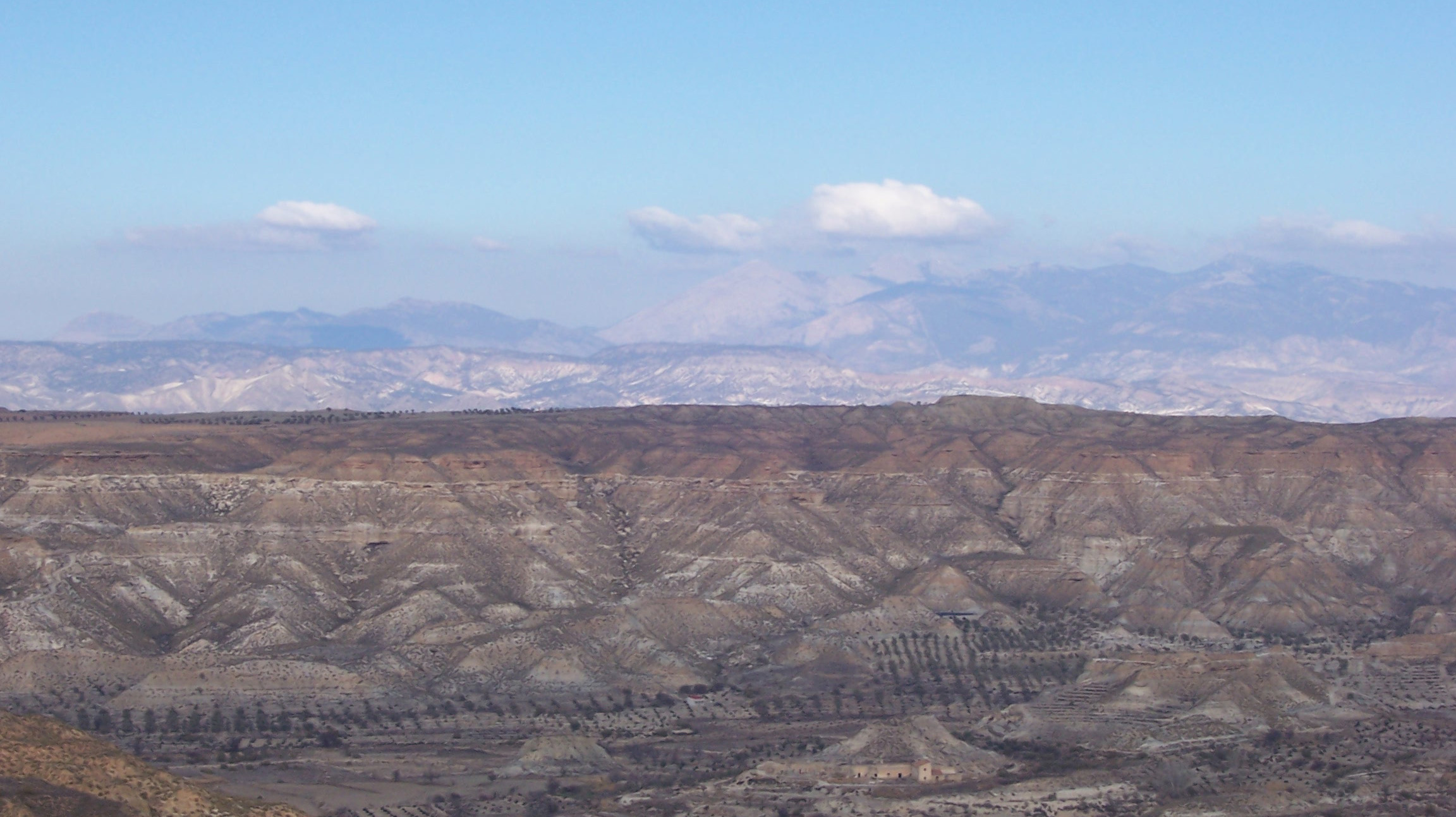 Paisaje de bad-lands en el altiplano granadino.